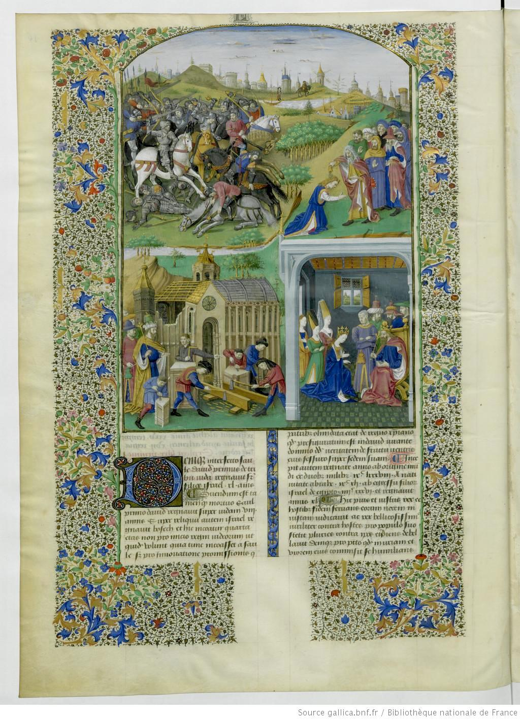 Mare Historiarum - BNF Lat4915 Fol. 046v